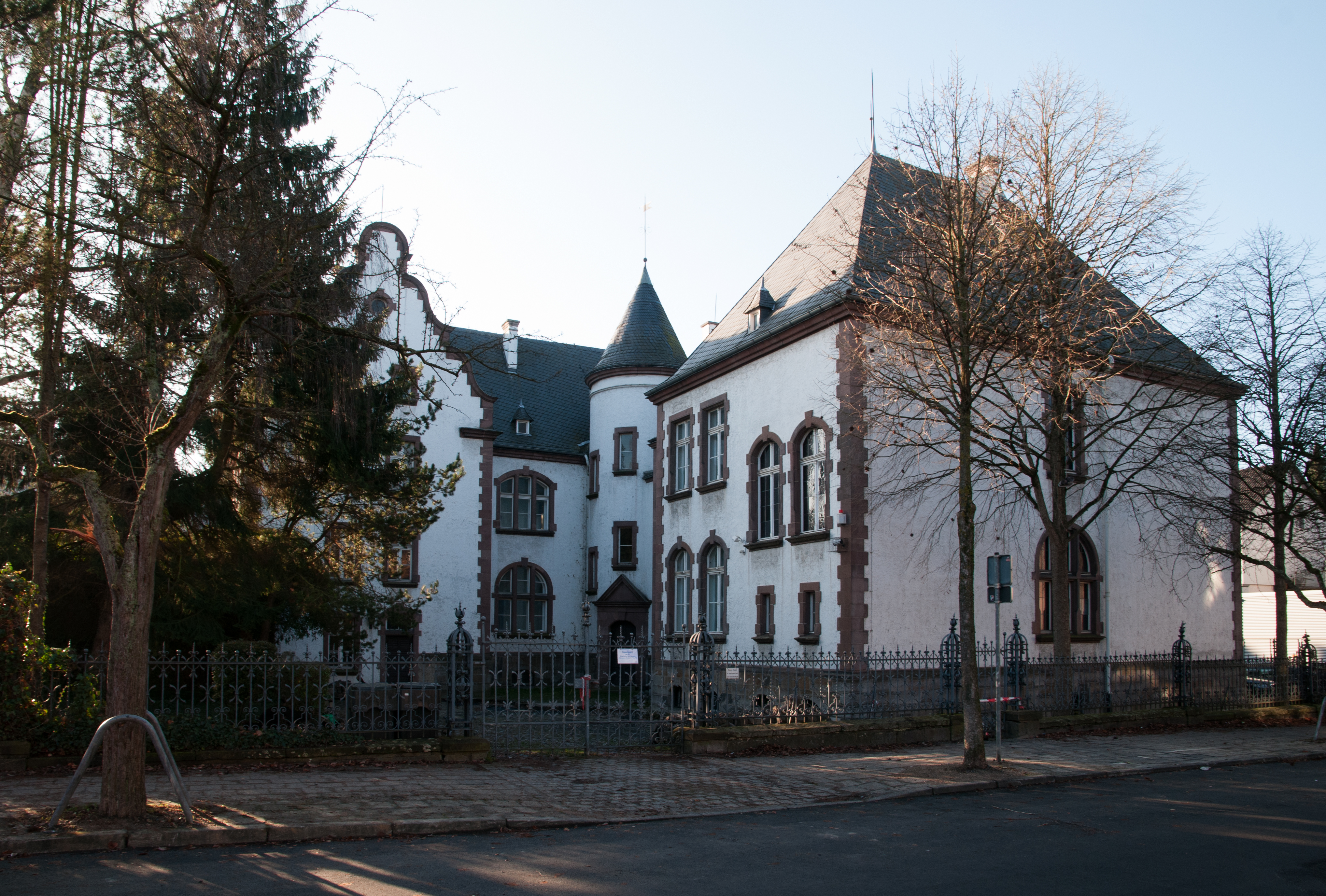 Altes Amtsgericht Neheim, heute Stadtbüro This image shows a heritage building in Germany, located in the North Rhine-Westphalian city Arnsberg (no. DL 137).